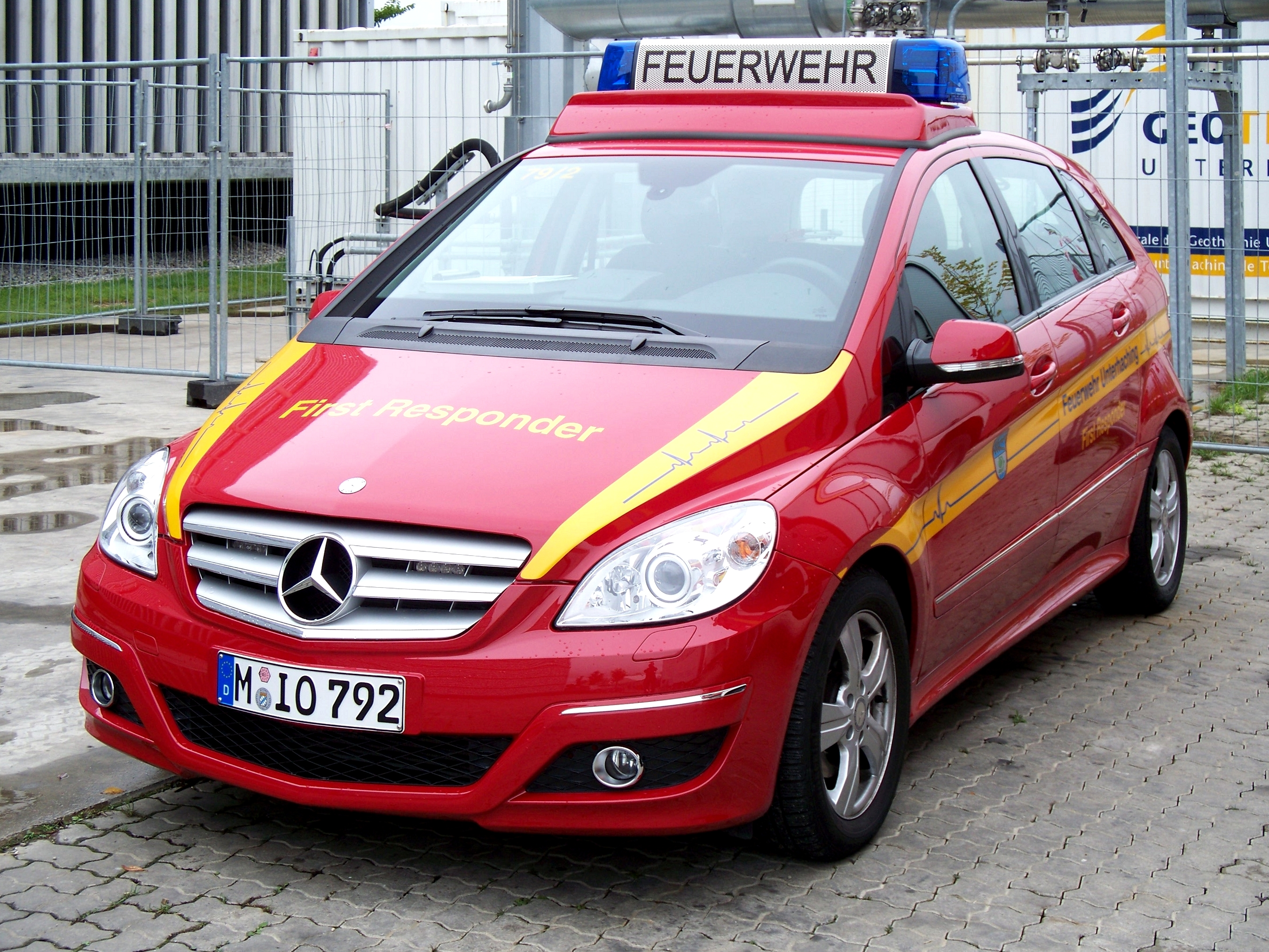 First Responder (Notfallhelfer) der FFW Unterhaching.